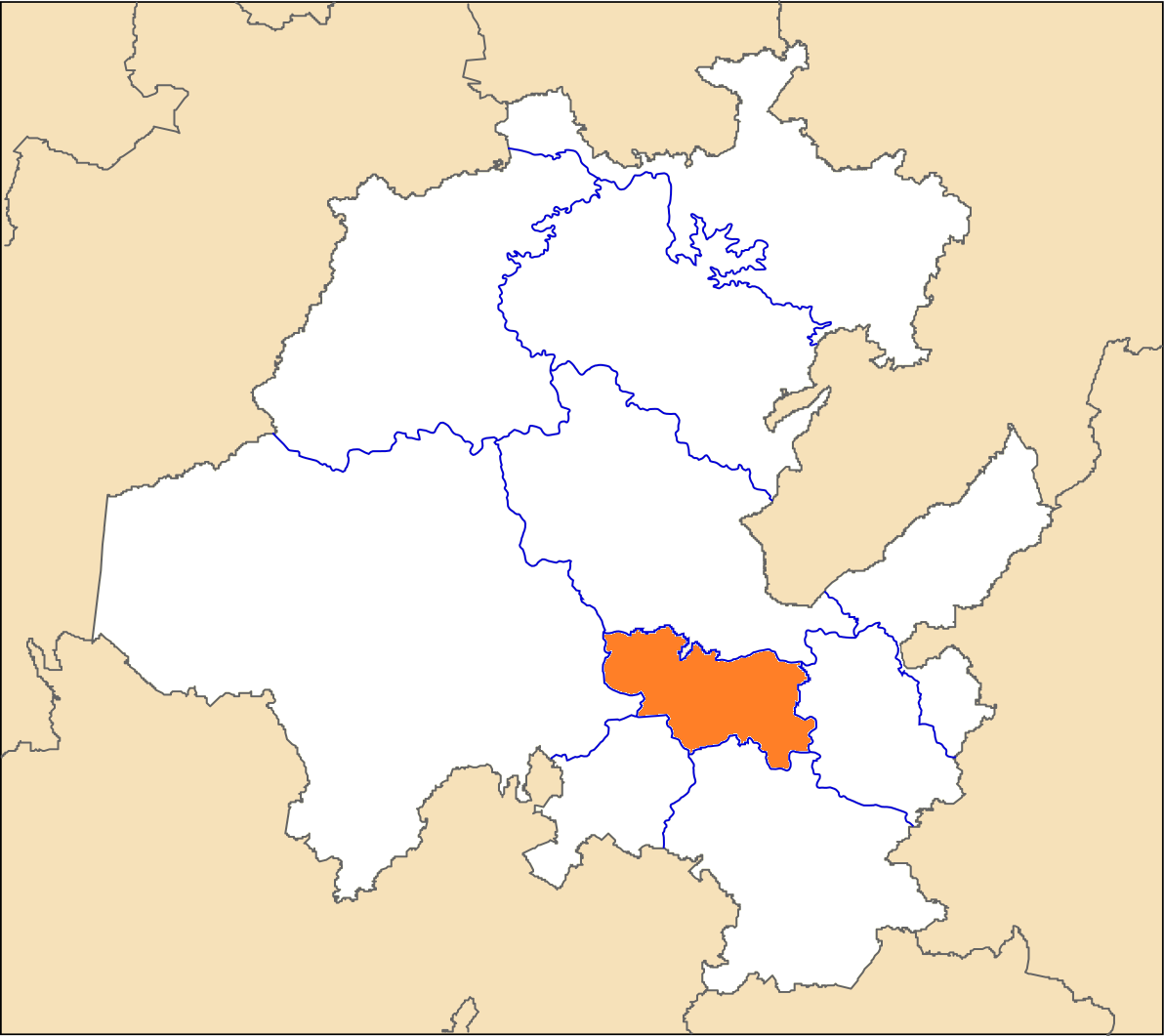 Region Geografica de Hidalgo